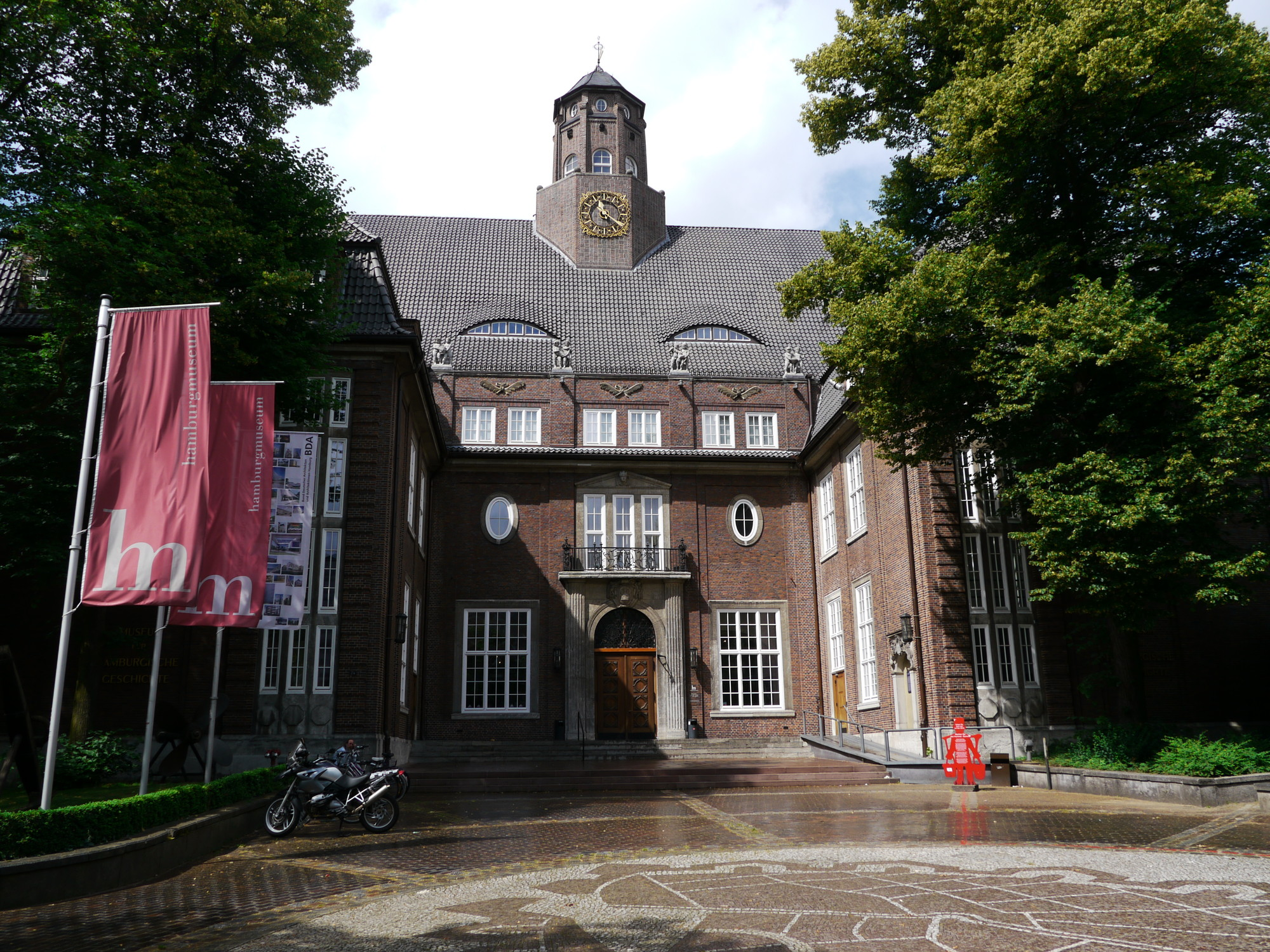 Haupteingang des Hamburgmuseums This is a photograph of an architectural monument.